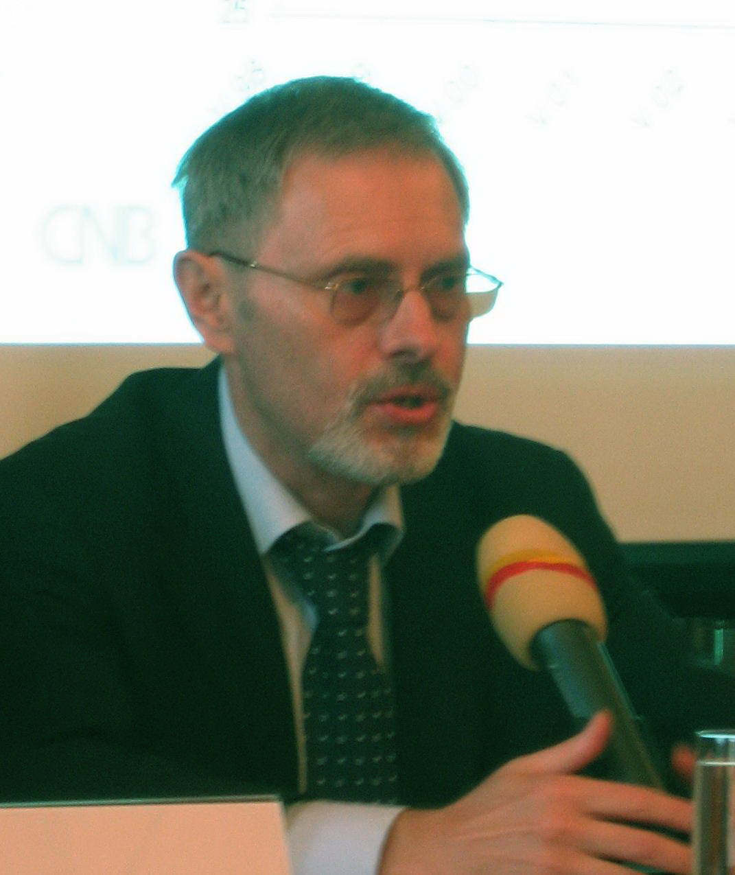 Robert Holman